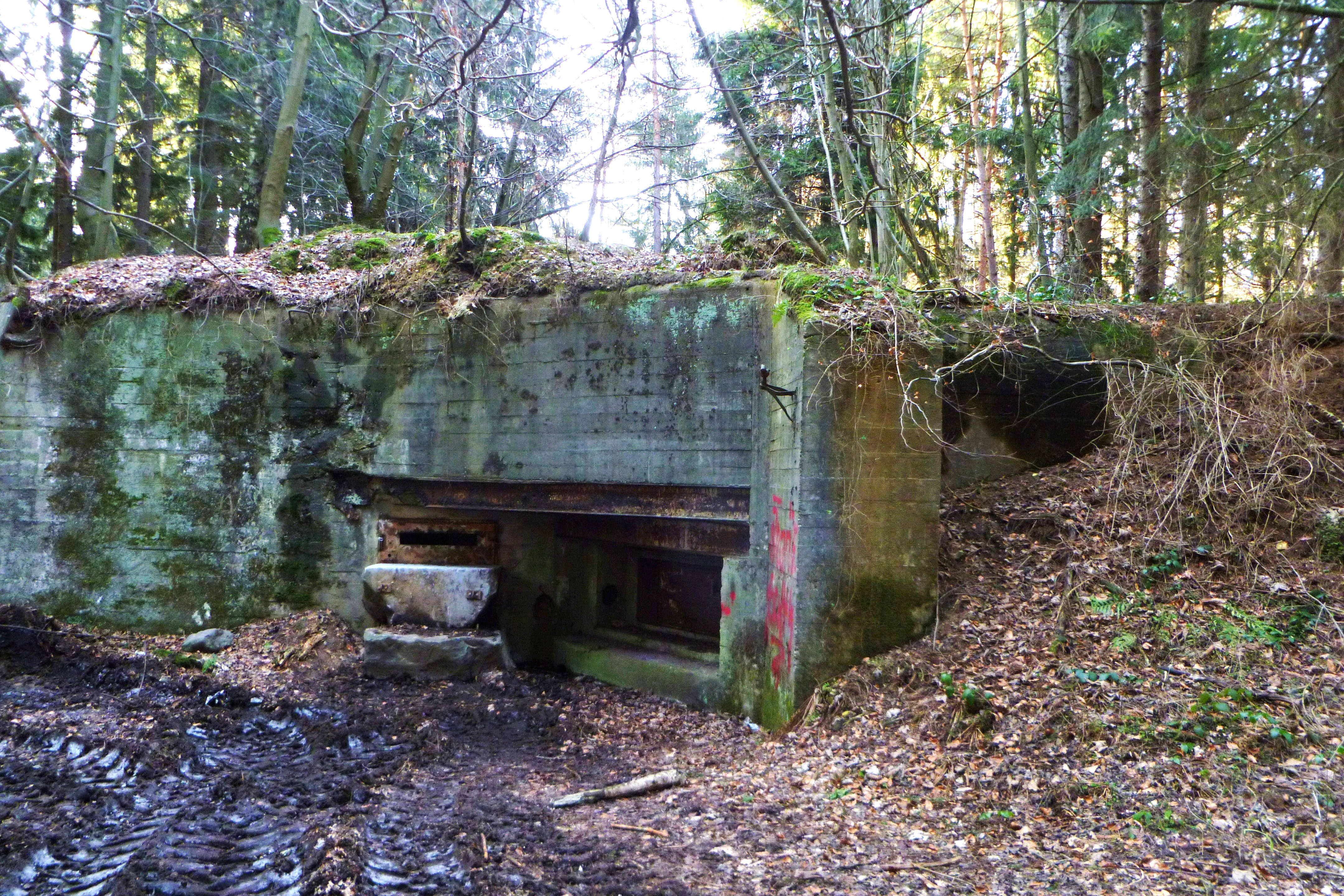 Baudenkmal in Aachen-Mitte